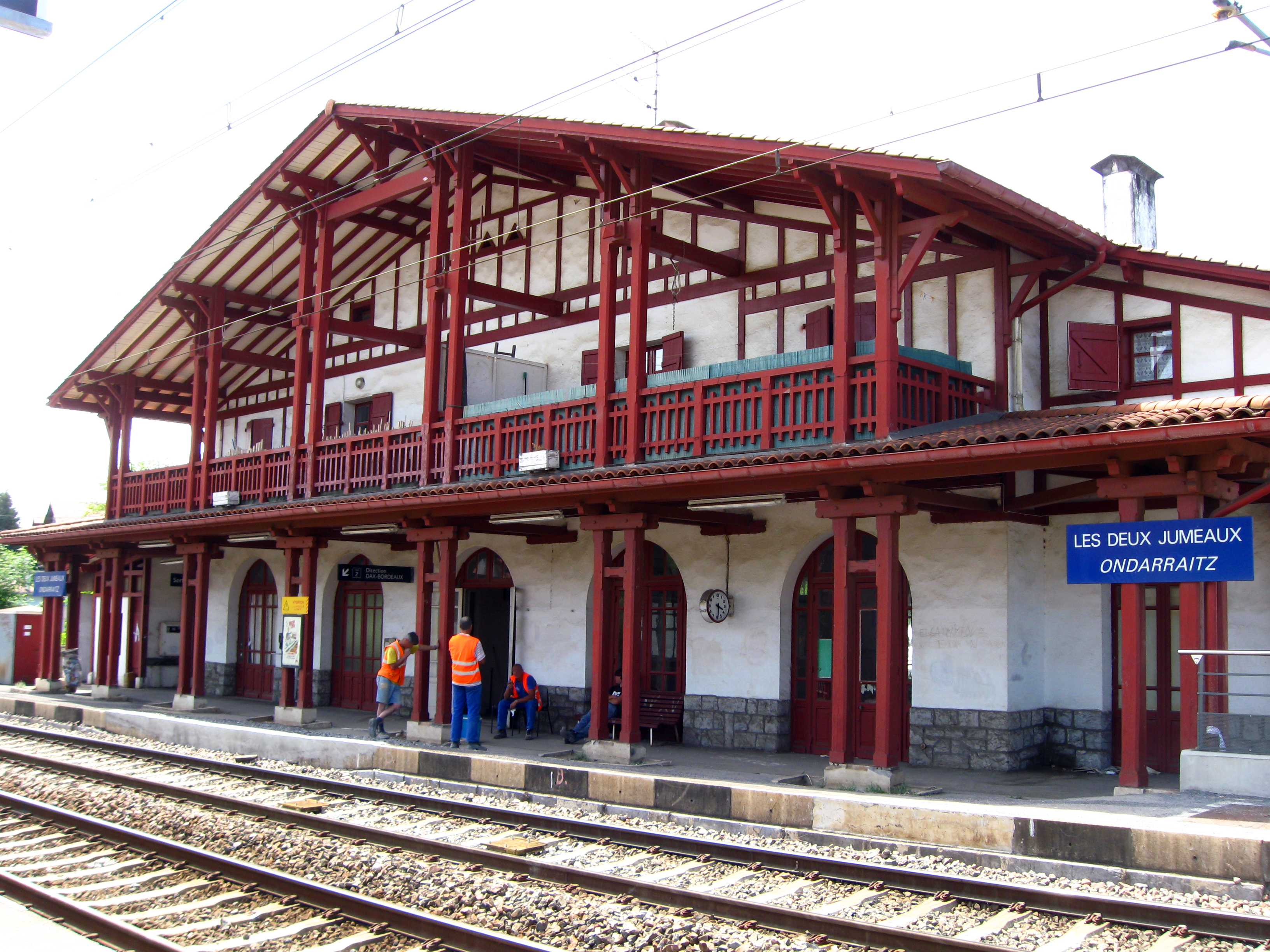 Hendaye, la gare des Deux Jumeaux-Ondarraitz côté voies.